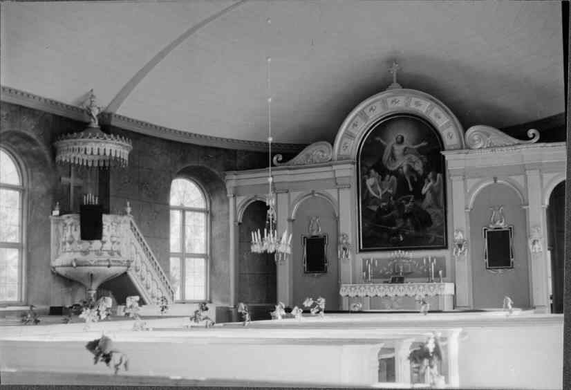 Interiör mot nordöst, altare och predikstol. Kategori: (02) InteriörerInteriör mot nordöst, altare och predikstol.